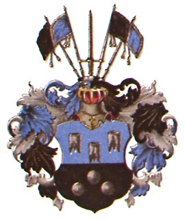 Vaakuna